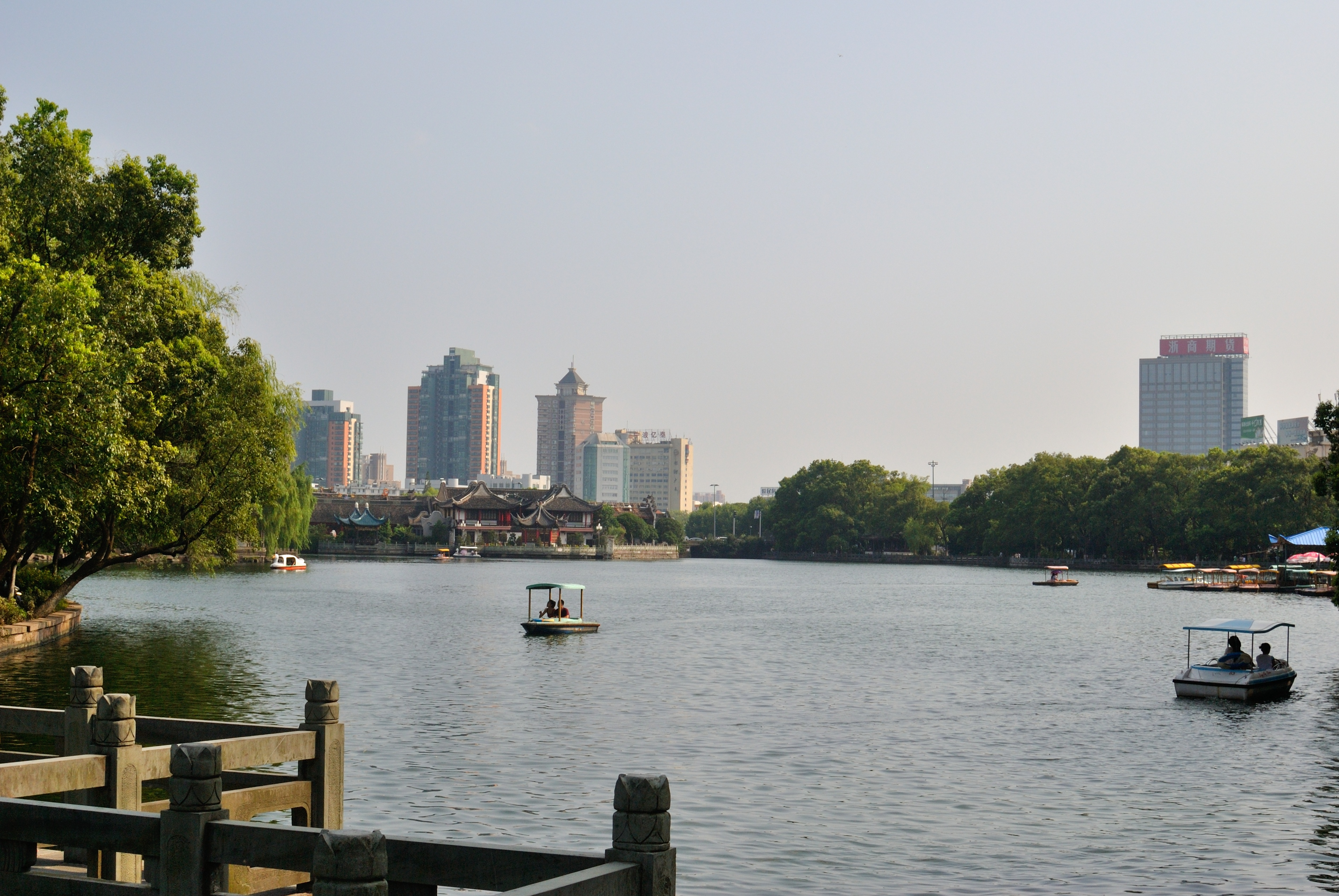 宁波月湖北侧